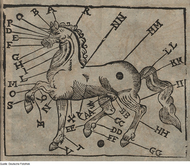 Original image description from the Deutsche FotothekTiermedizin & Tierbuch & Hausväterliteratur & Pferd